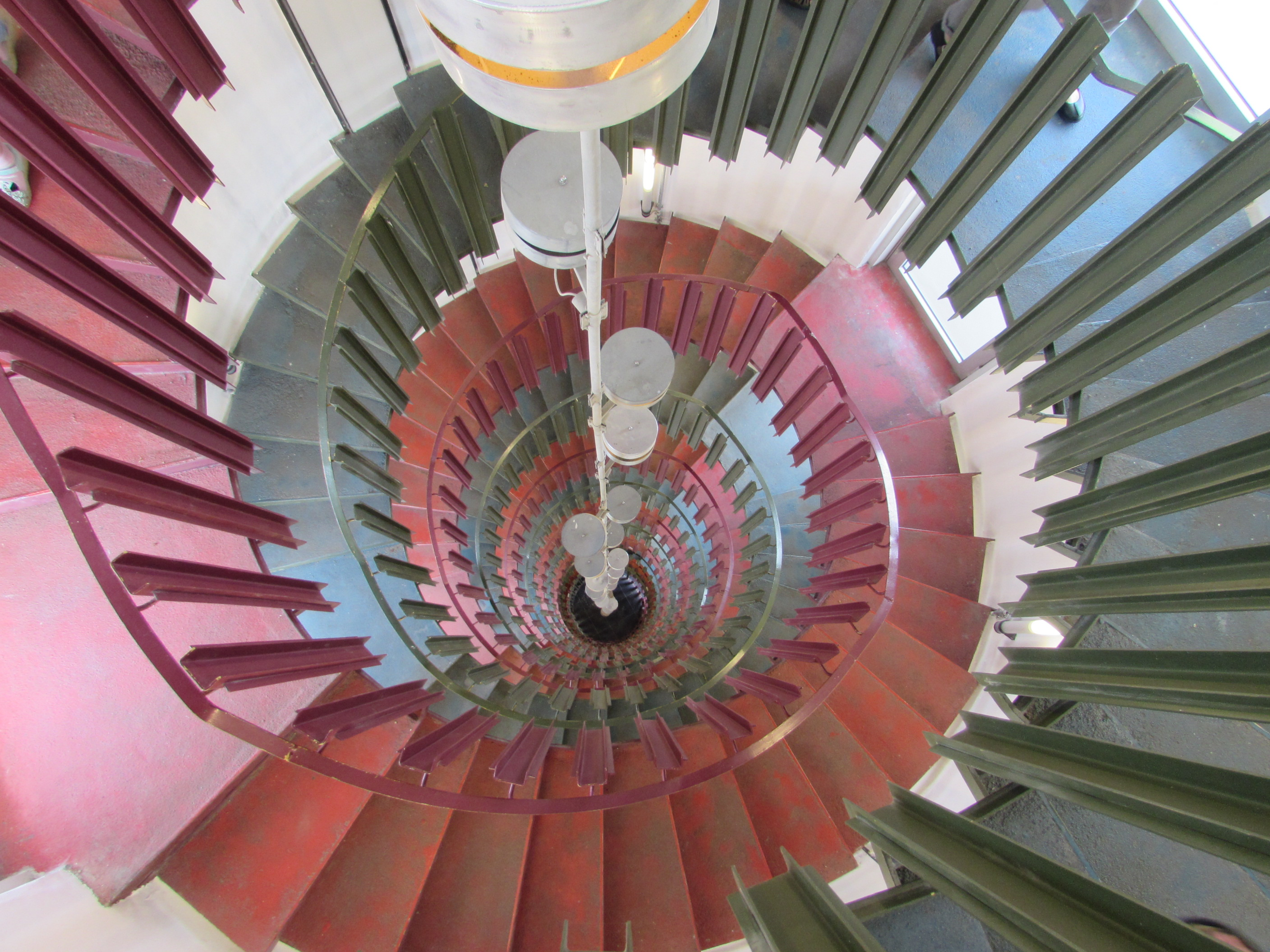 treppenhaus friedenswarte brandenburg